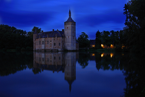 Horst un soir de légende